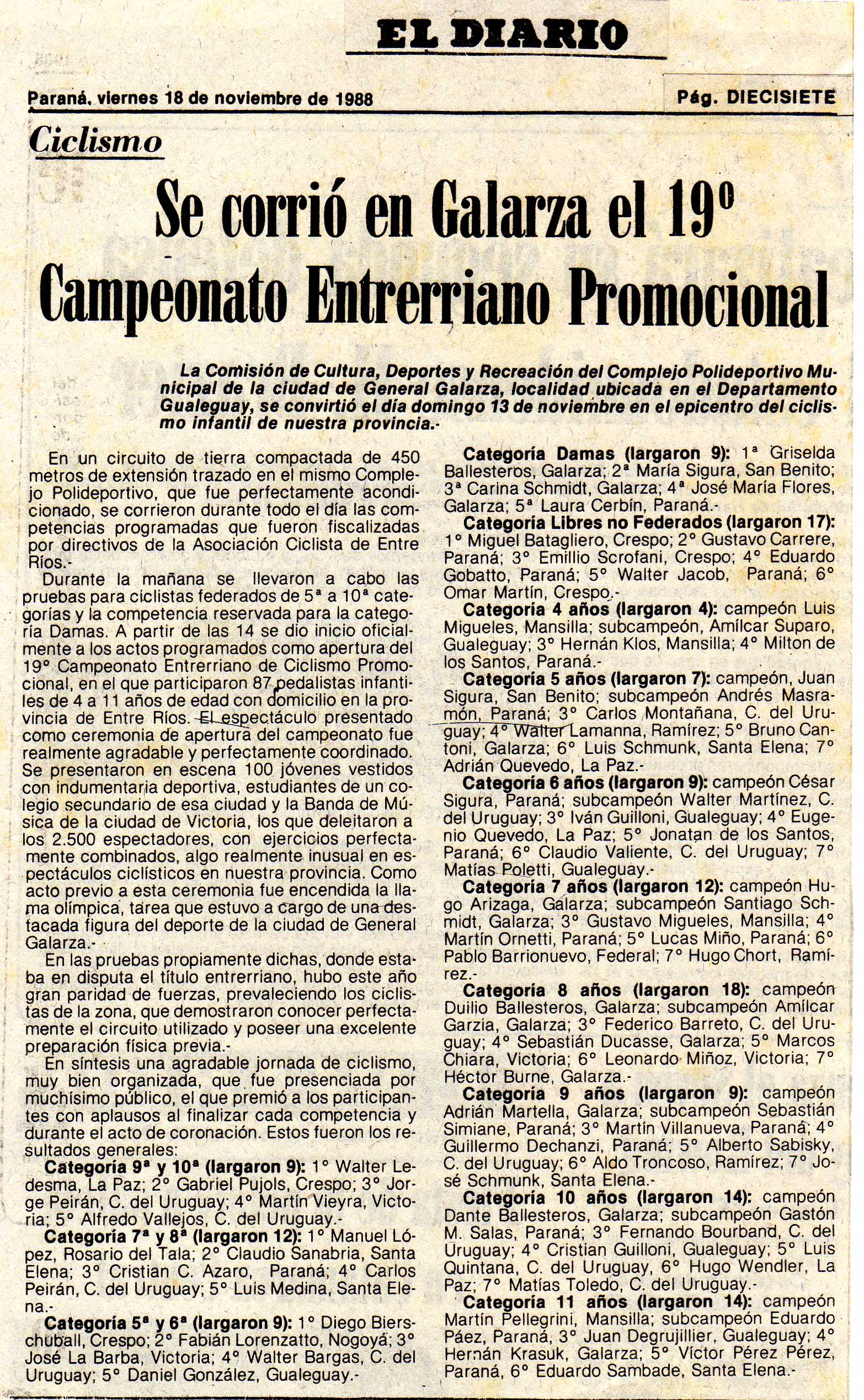 19º Campeonato Entrerriano de Ciclismo Promocional - El Diario de Paraná